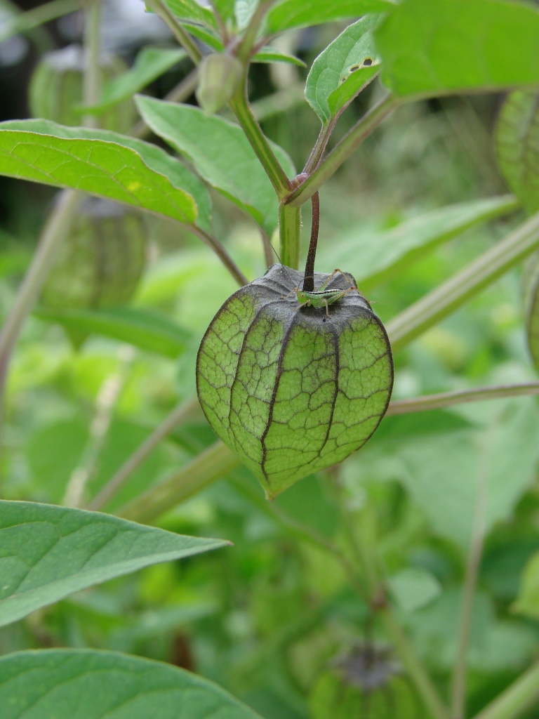 Fruit of Physalis angulata L. - SOLANACEAE - Parque Vivencial Asa Norte - Brasília - Distrito Federal - Brasil.